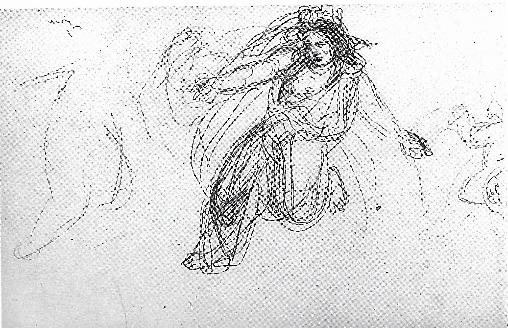 Vorzeichnung für das Gemälde "La Grèce sur les ruines de Missolonghi", stellt die Göttin Tyche mit Krone dar, Paris, Louvre (RF 9145 fol. 12v)